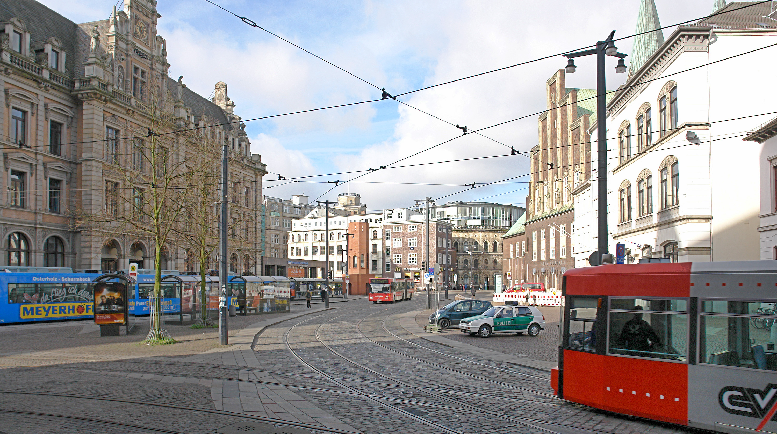 Bremen: Blick vom Gerichtsgebäude auf die Domsheide. Links das alte Postamt, rechts mit Stufengiebel das Konzerthaus Die Glocke